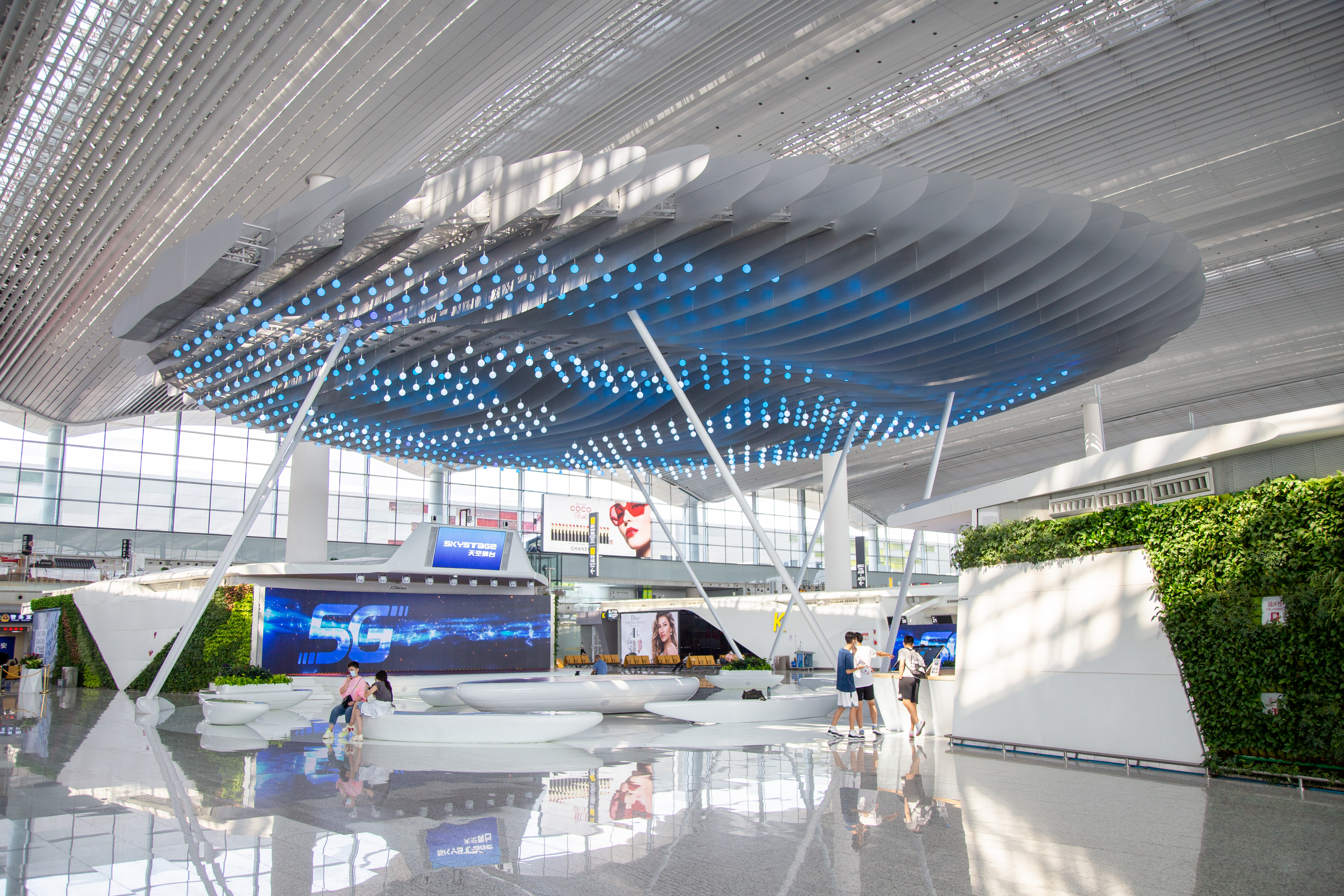 中文（香港）: 廣州白雲國際機場二號客運大樓出發大堂天空舞臺